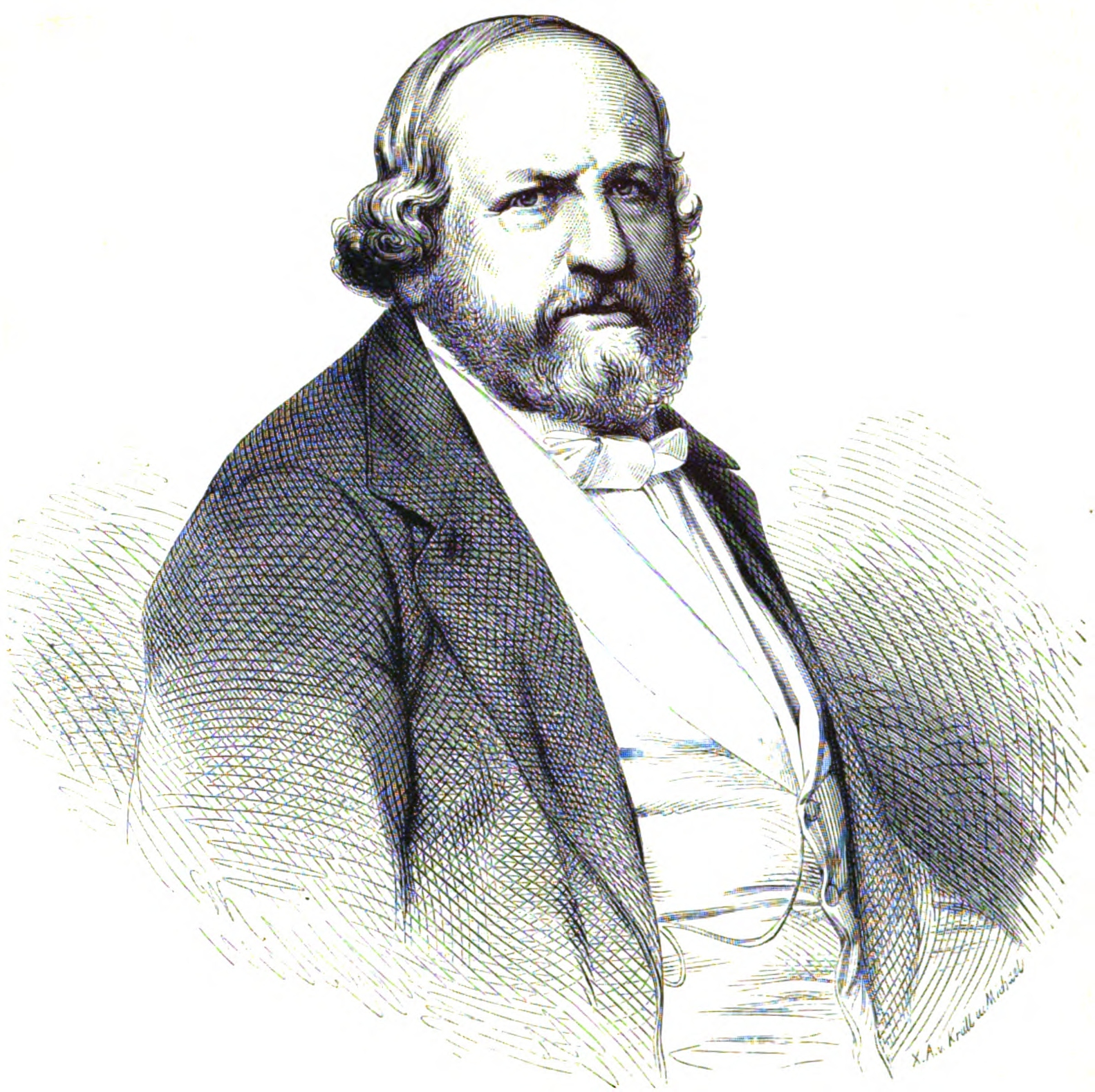 Ferdinand Hiller, deutscher Komponist und Musikpädagoge im 19. Jh.